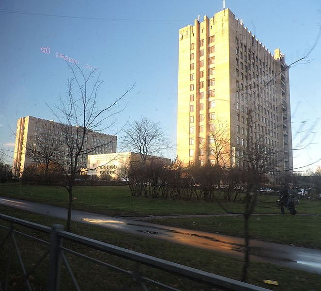 ФГБУ СПб НЦЭПР им. Г. А. Альбрехта (Бестужевская улица, 50)